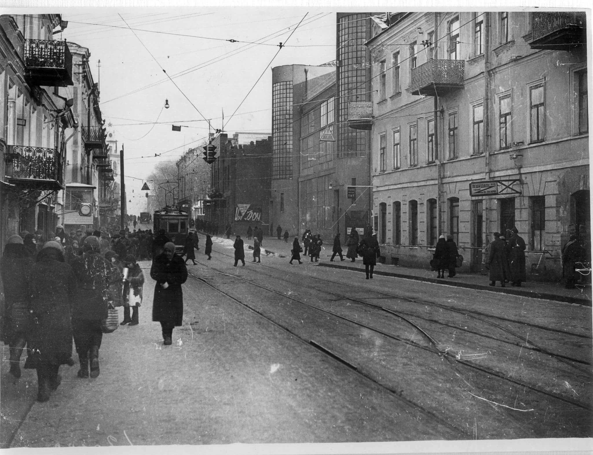 Вуліца Савецкая ў Менску. Праваруч будынак Дзяржбанка, кінатэатр Чырвоная Зорка. Зіма 1933—1934 гг.